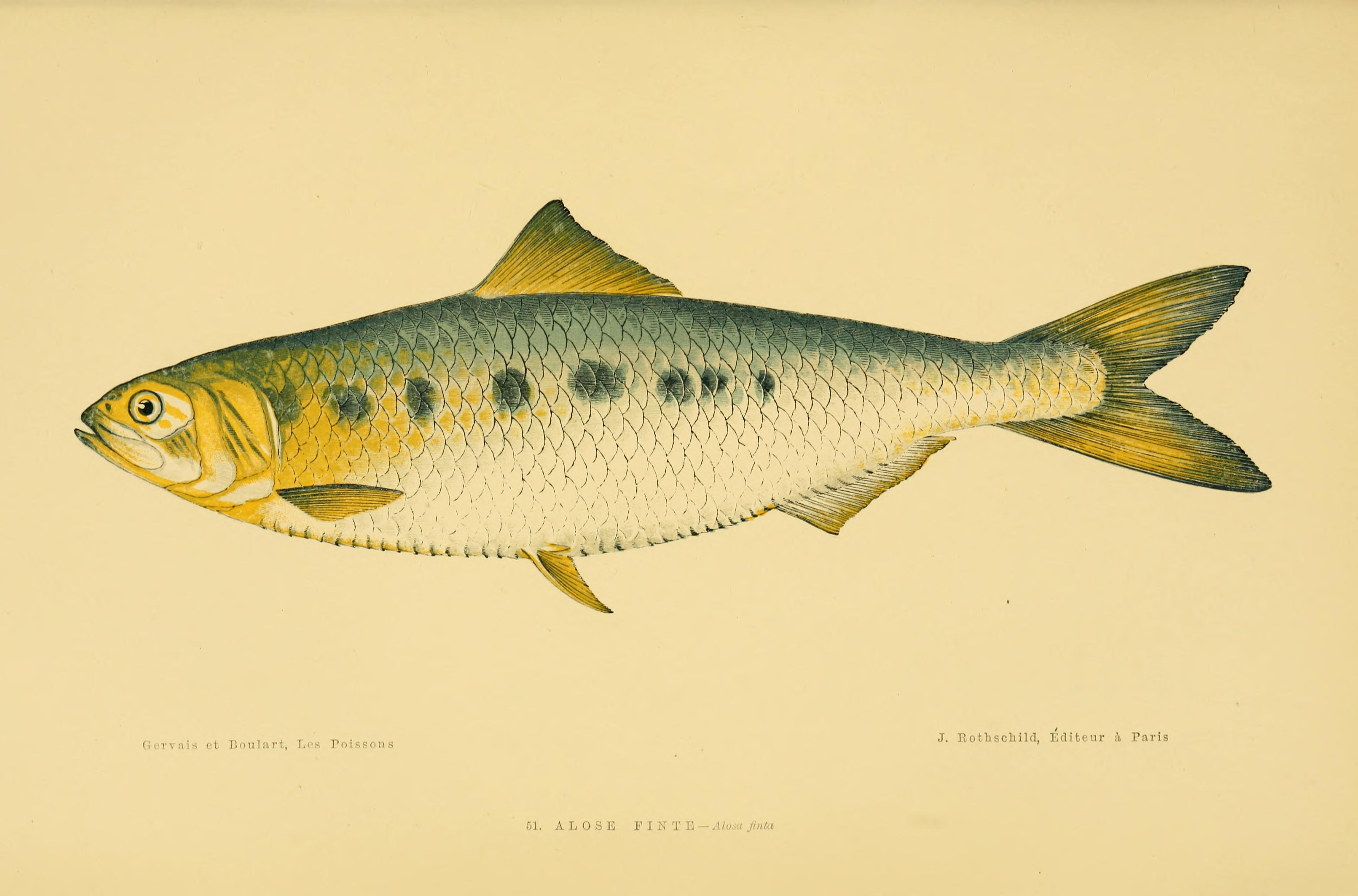 Alosa agone syn. A. fintaLes poissons : synonymie--description--mœurs--frai--pêche--iconographie, des espèces composant plus particulièrement la faune française / par H. Gervais et R. Boulart ... Avec une introduction par Paul Gervais.